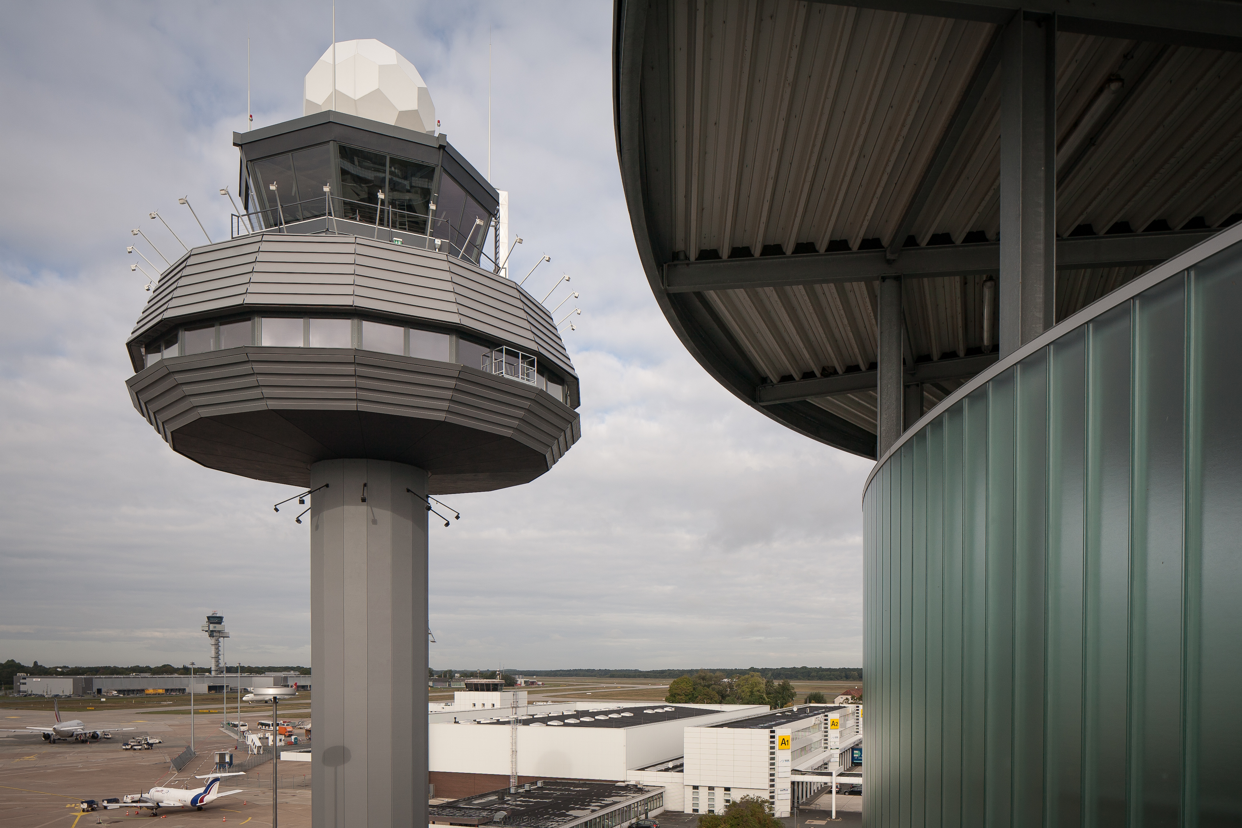 Der zweite Tower des FLughafens Hannover, errichtet 1966. Rechts im Bild